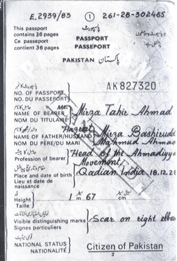 Reisepass des vierten Kalifen der Ahmadiyya. Hadhrat Mirza Tahir Ahmad konnte trotz eines beabsichtigten Ausreiseverbots Pakistan verlassen, da Zia ul-Haq diesen auf seinen bereits verstorbenen Vorgänger verhängte.